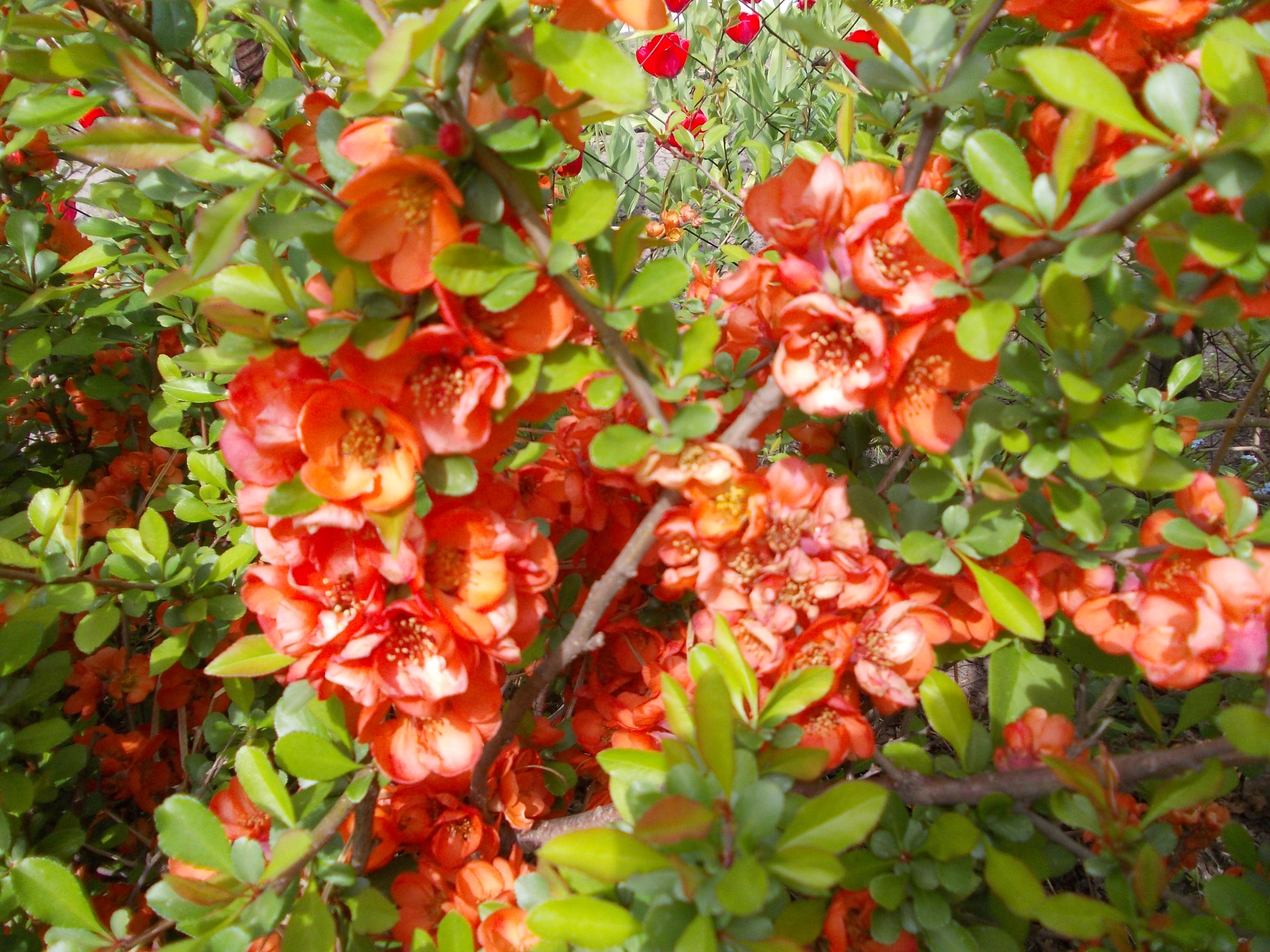 Краса відкритого кольору неймовірна, кущ буквально палає!!! Кущі барбарису в дивному багатті червоного, дійсто травневий колір!!!